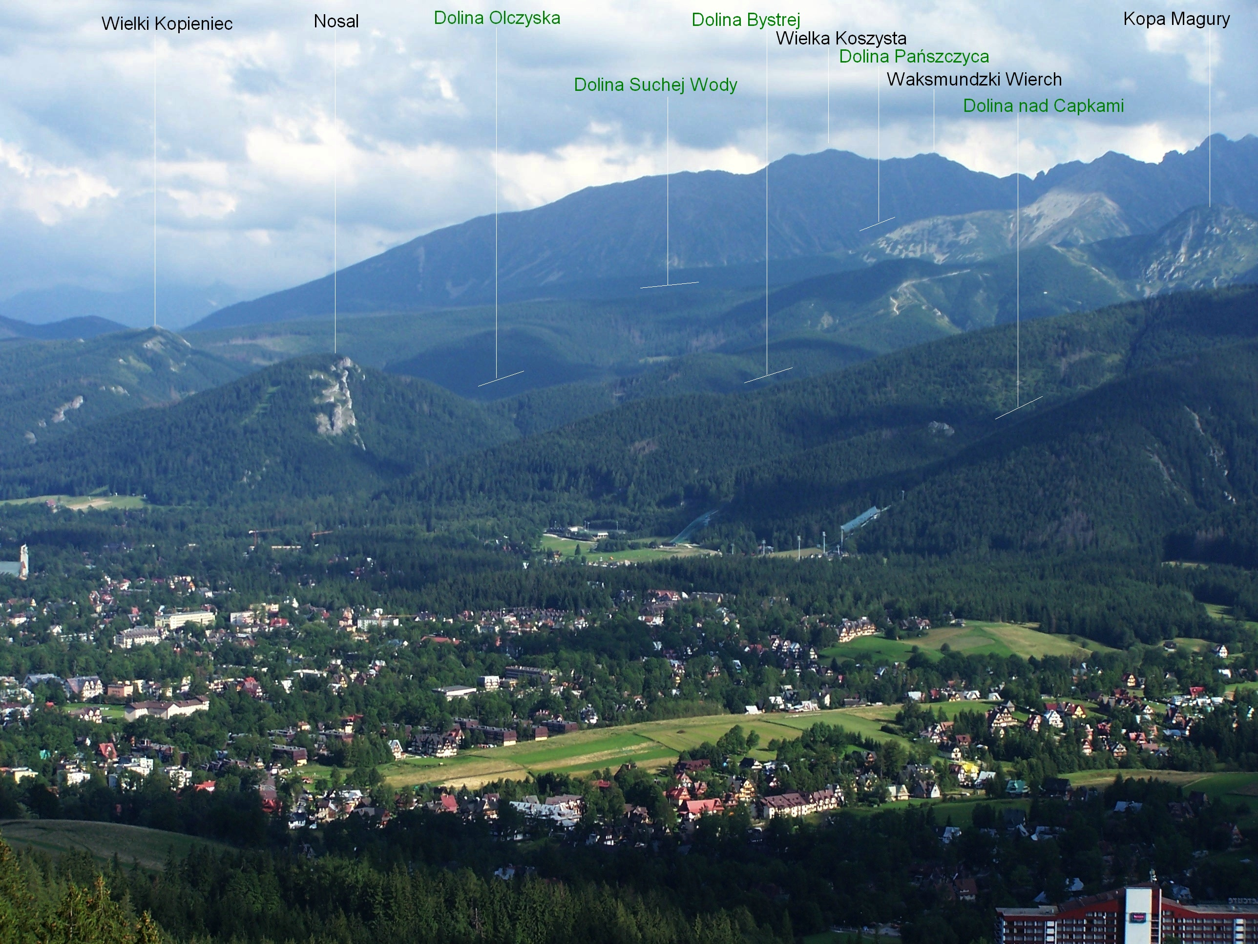 Widok z Pasma Gubałowskiego